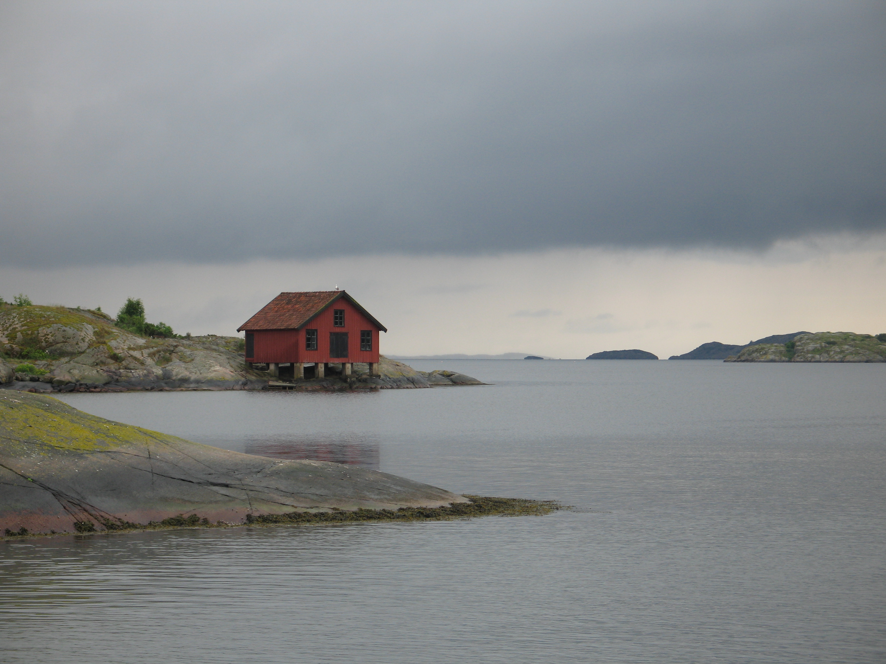 Sjøbod utenfor Dynekilen